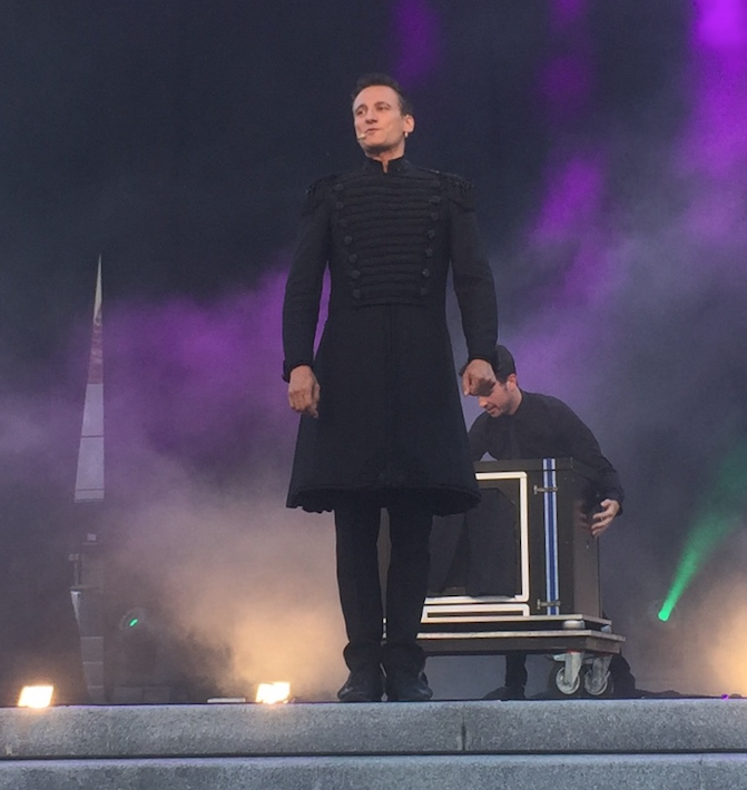 Fotografia de Mag Lari en una actuació davant l'ajuntament de Sant Vicenç dels Horts el juliol de 2018 amb l'espectacle "Una nit amb el Mag Lari".